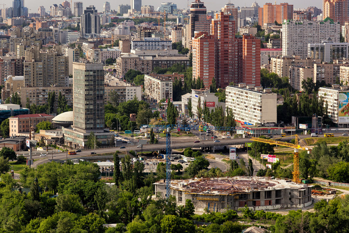 Вид строящегося собора.